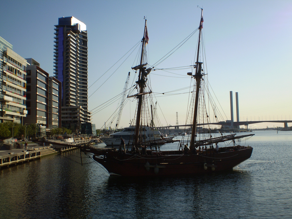 L' "Enterprize" goélette australienne , réplique de l'Enterprize de 1829